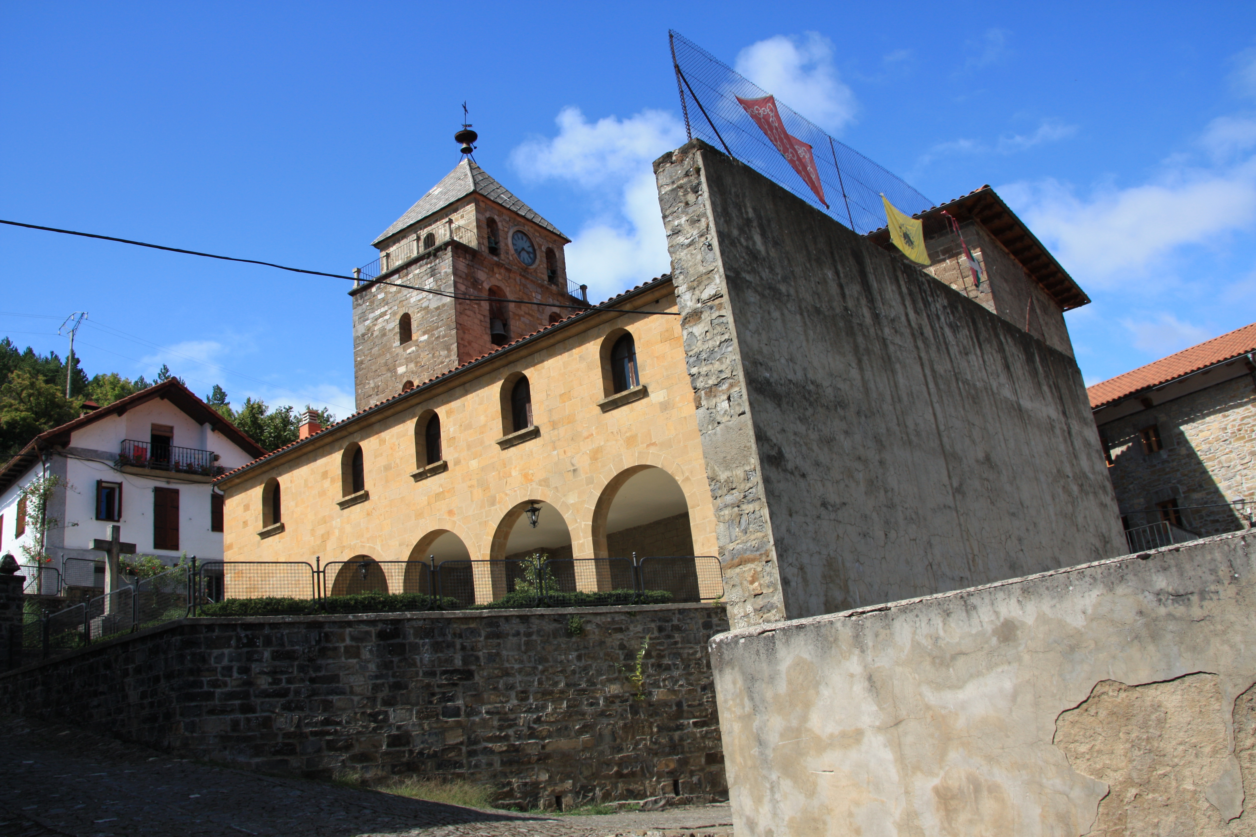 Herriko eliza eta frontoia.